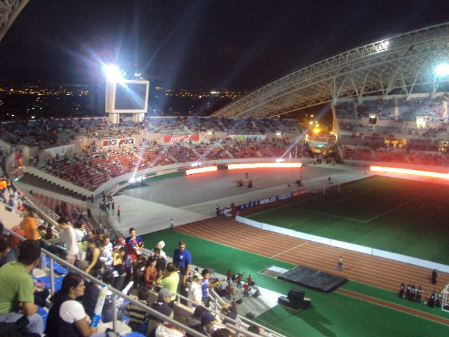 Vista desde las graderías del nuevo estadio de Costa Rica